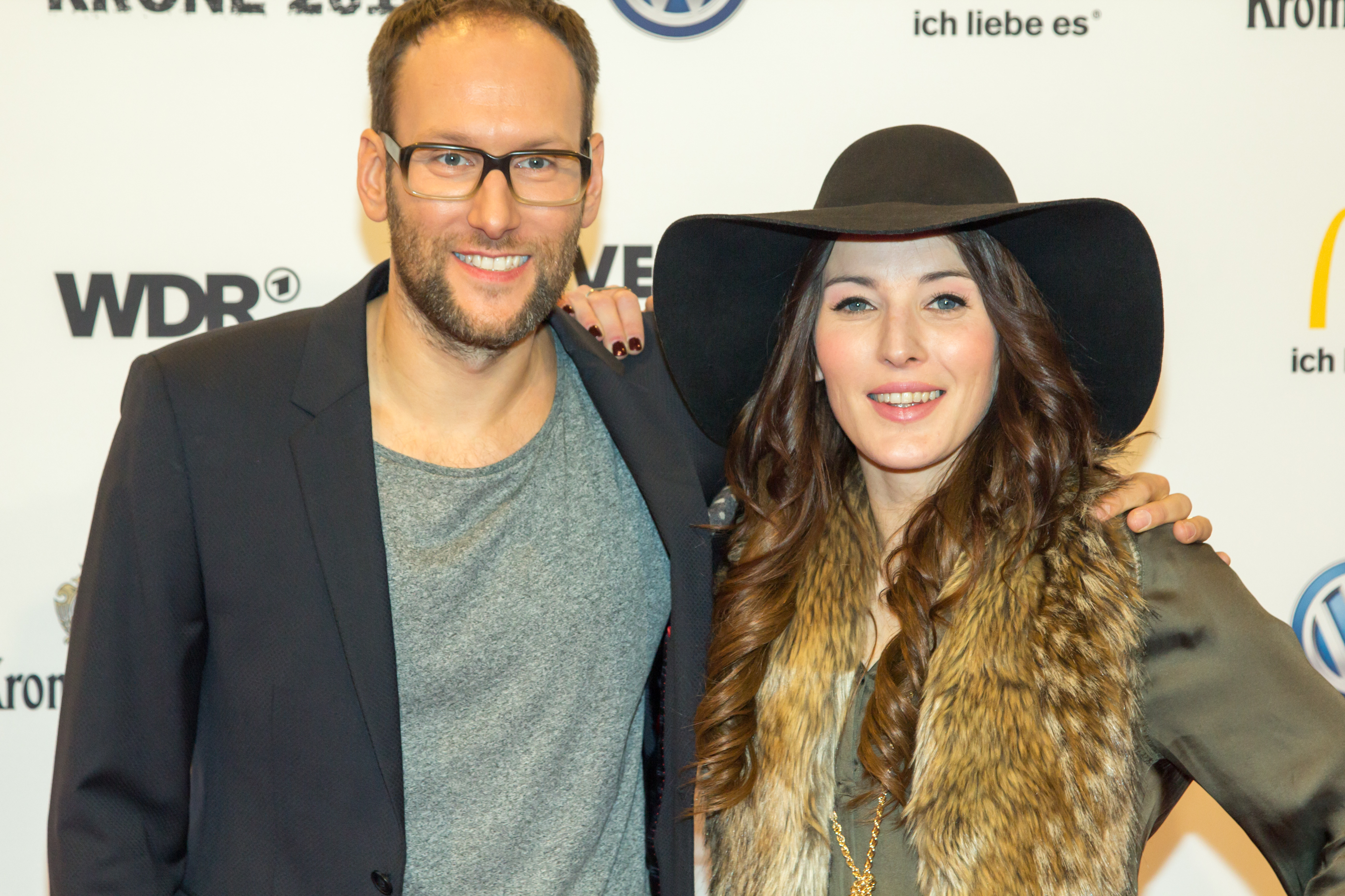 1LIVE Krone 2014 in der Bochumer Jahrhunderthalle: Simon Beeck und Jeannine Michaelsen (Moderation) auf dem roten Teppich